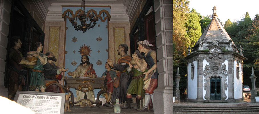 Capela do Encontro de Emaús no Bom Jesus - Braga, Portugal